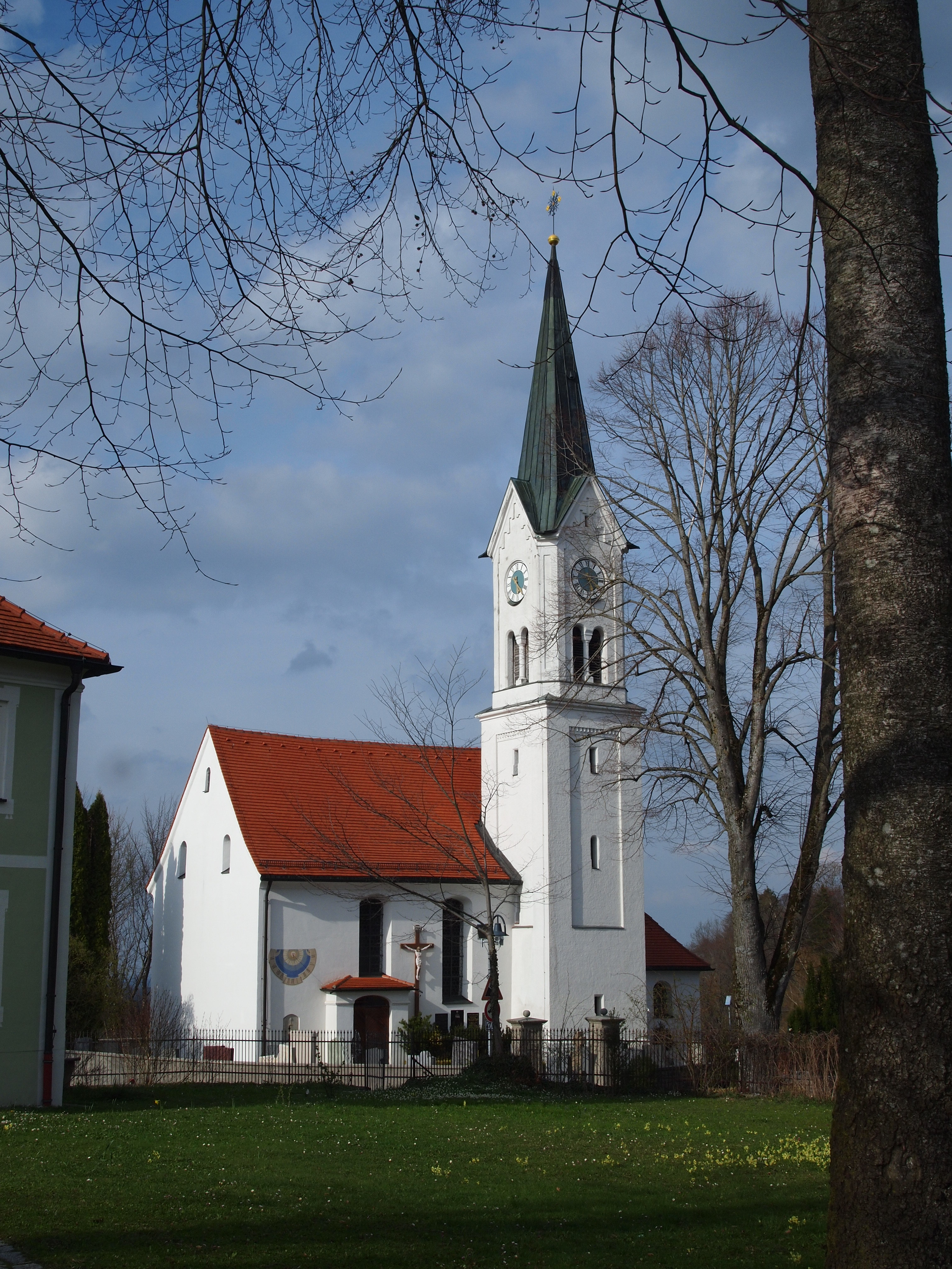 Kleinkemnat, Stefanstal 8, St Stephan